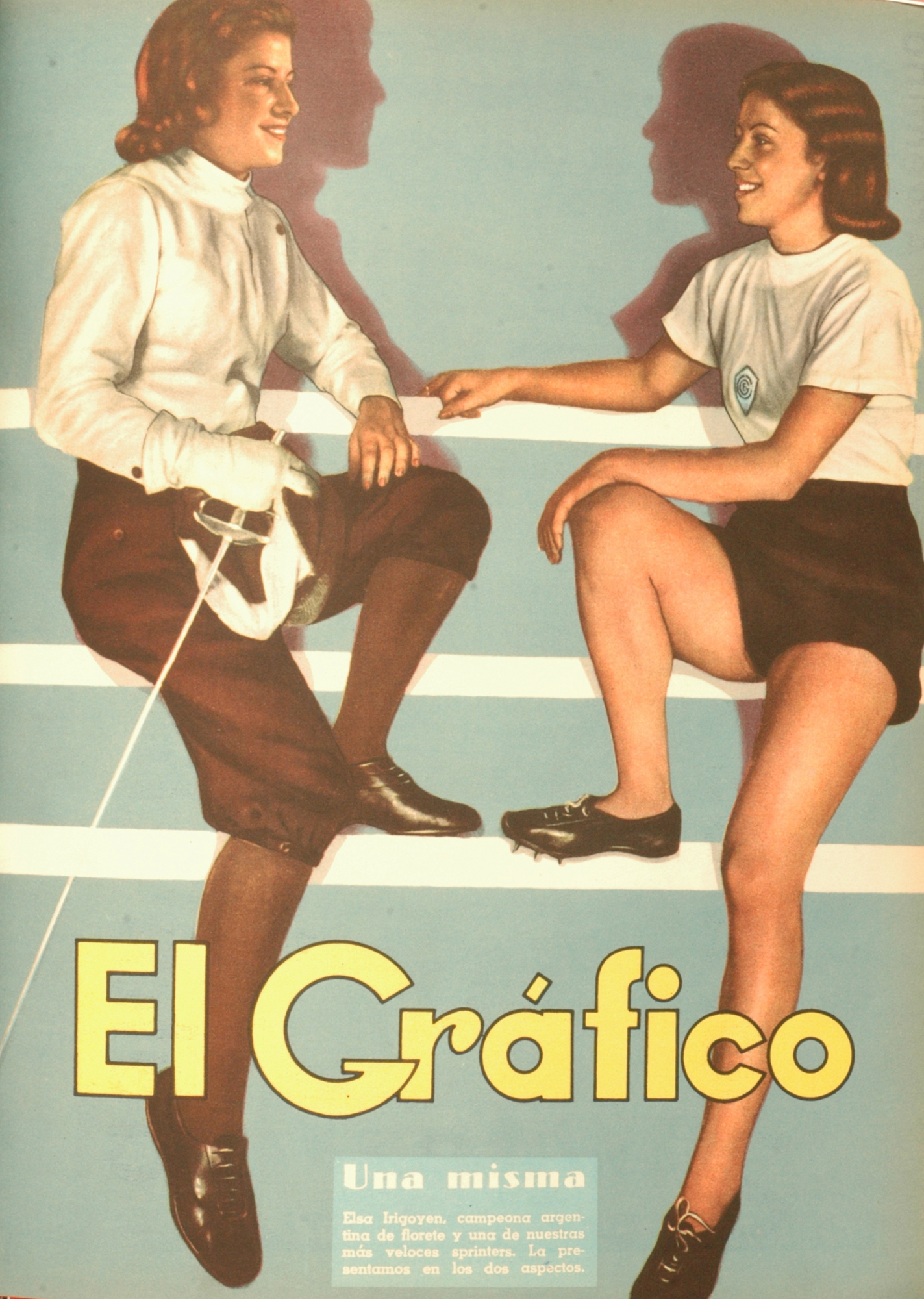 El Grafico del 13 de Enero de 1939. Edicion 1018